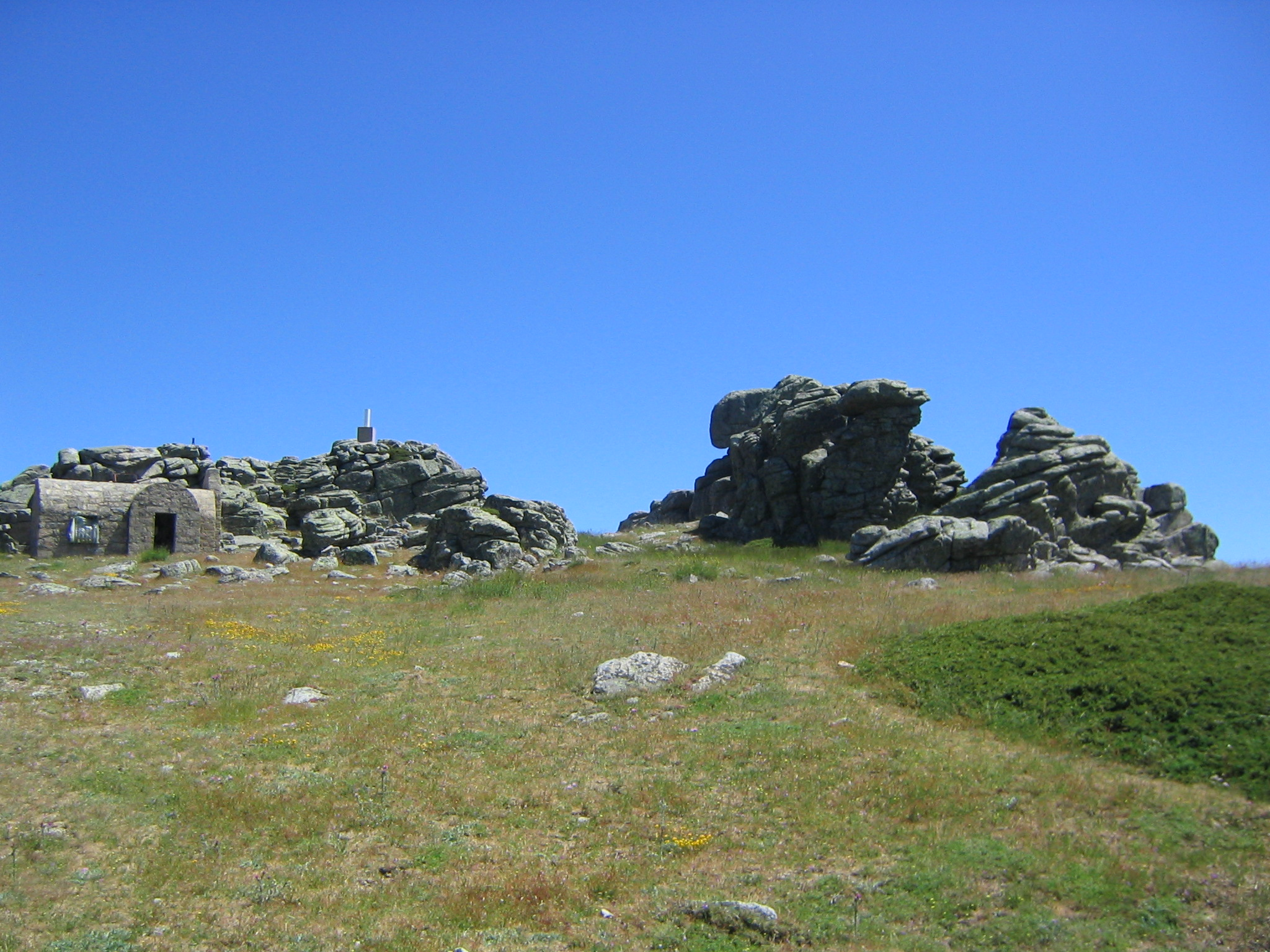 Cumbre de Cueva Valiente. El Espinar, Segovia, España.